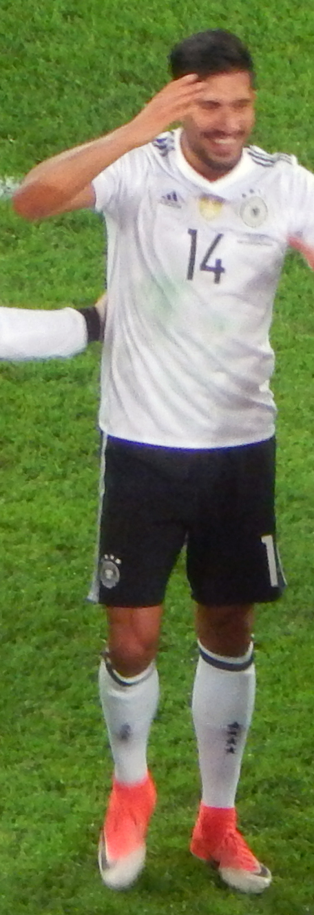 Финал Кубка конфедераций 2017